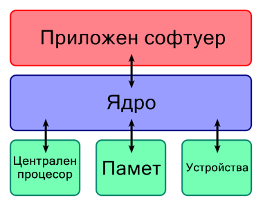 Показва ролята на ядрото в компютъра.